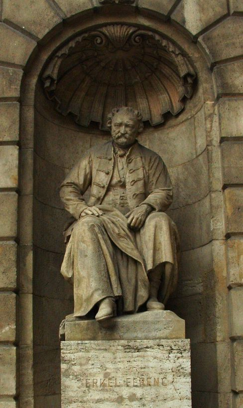 Erkel Ferenc szobra a Magyar Állami Operaház bejáratánál (Stróbl Alajos alkotása, 1885)